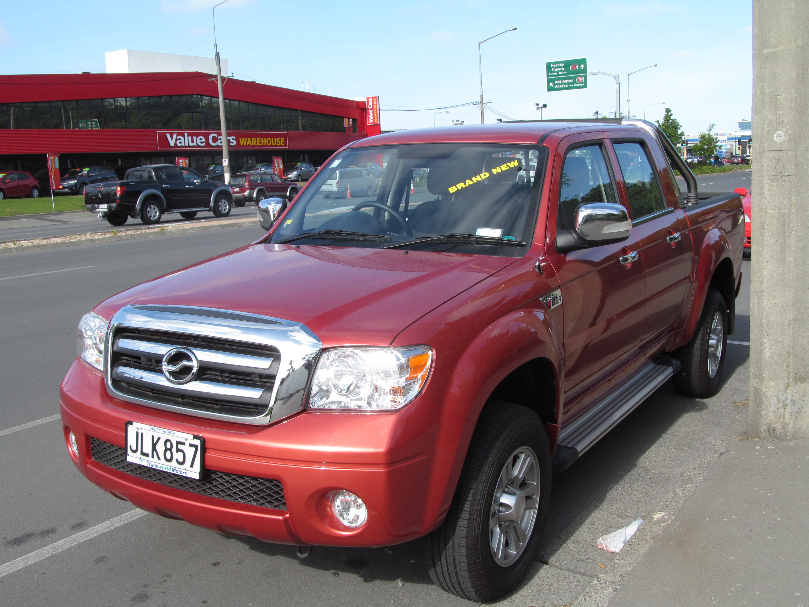 ZX Auto Grand Tiger in New Zealand.